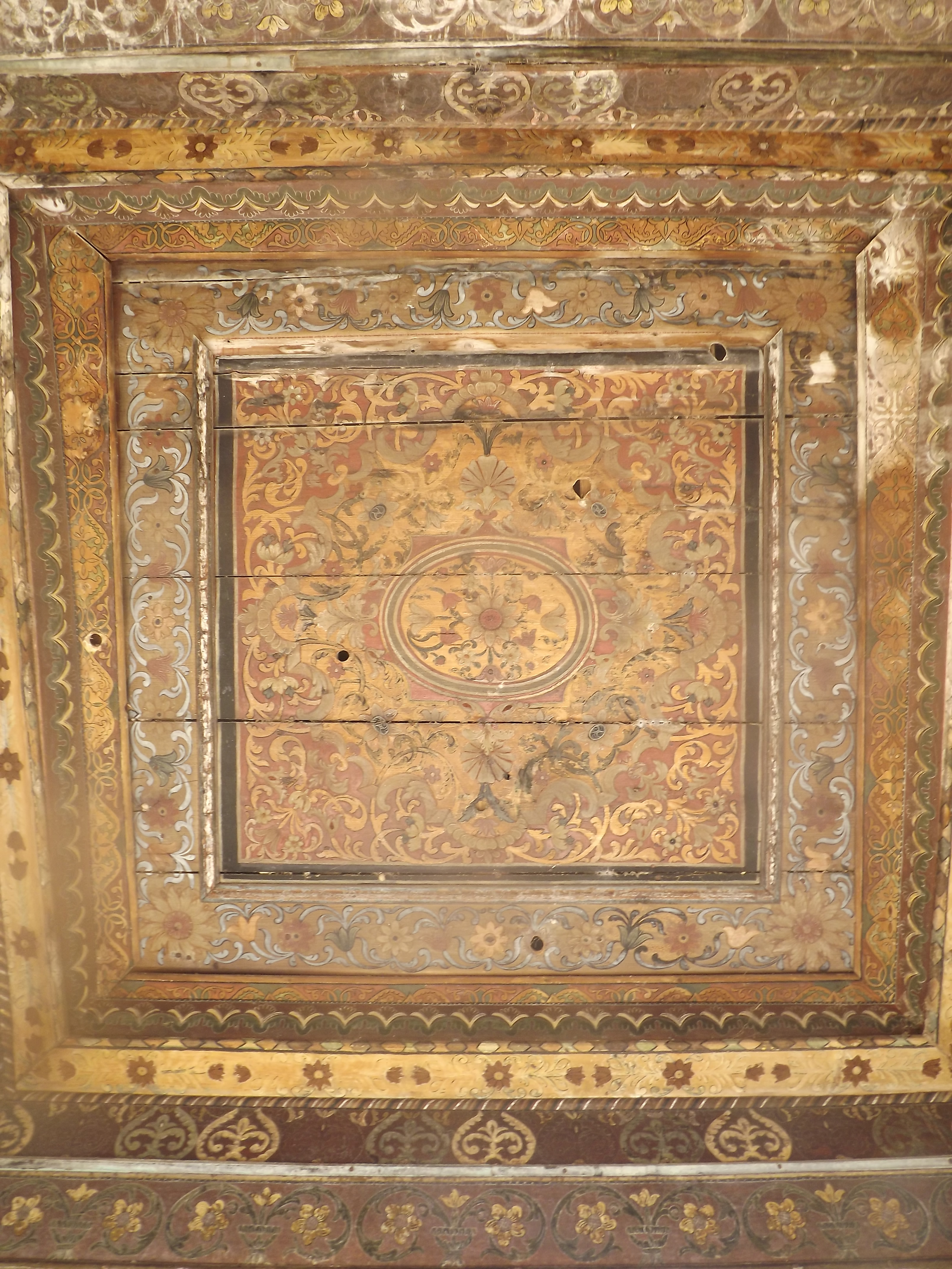 Palais Ben Ayed à Djerba